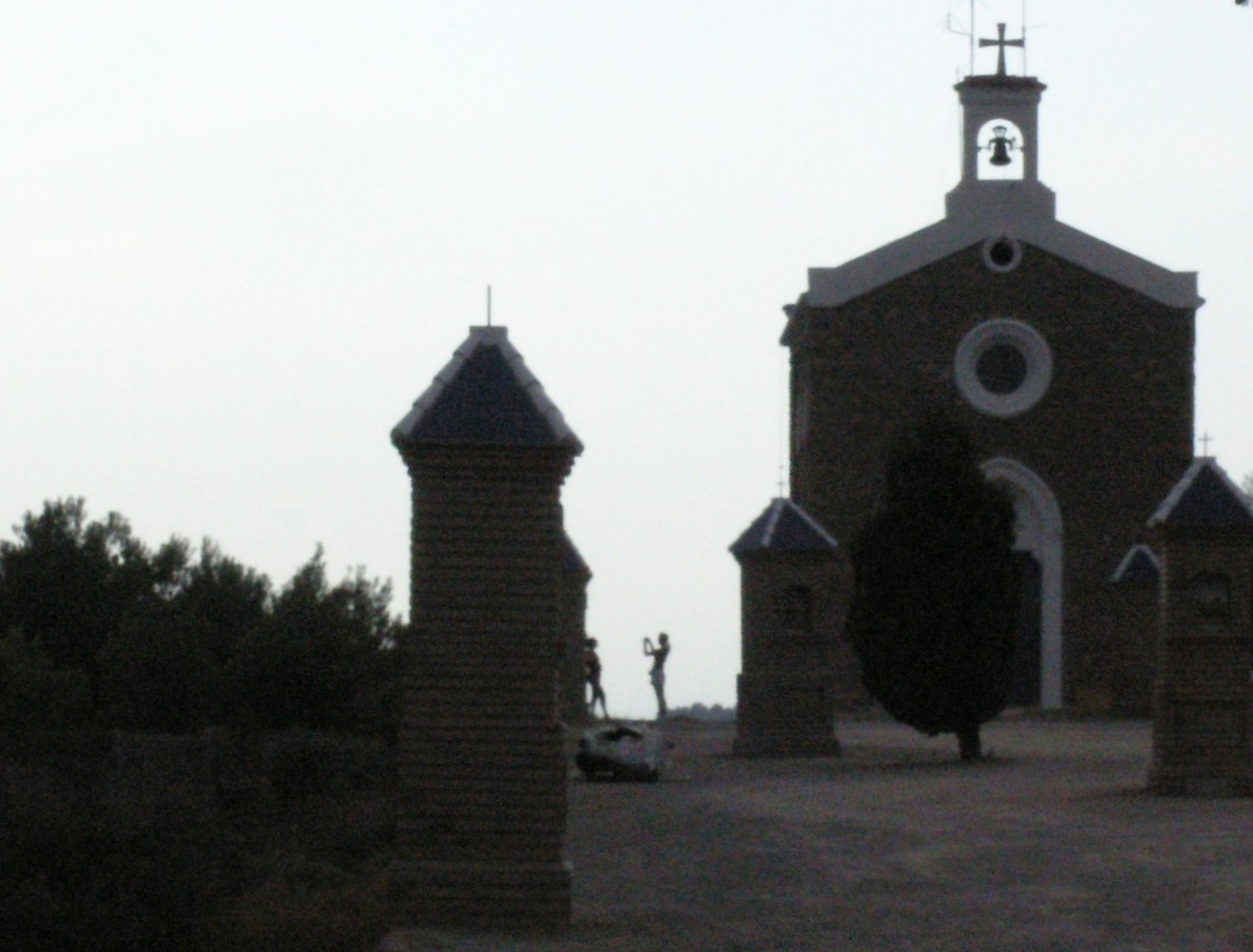 Ermita de Sant Francesc i Calvari 11.178-001.